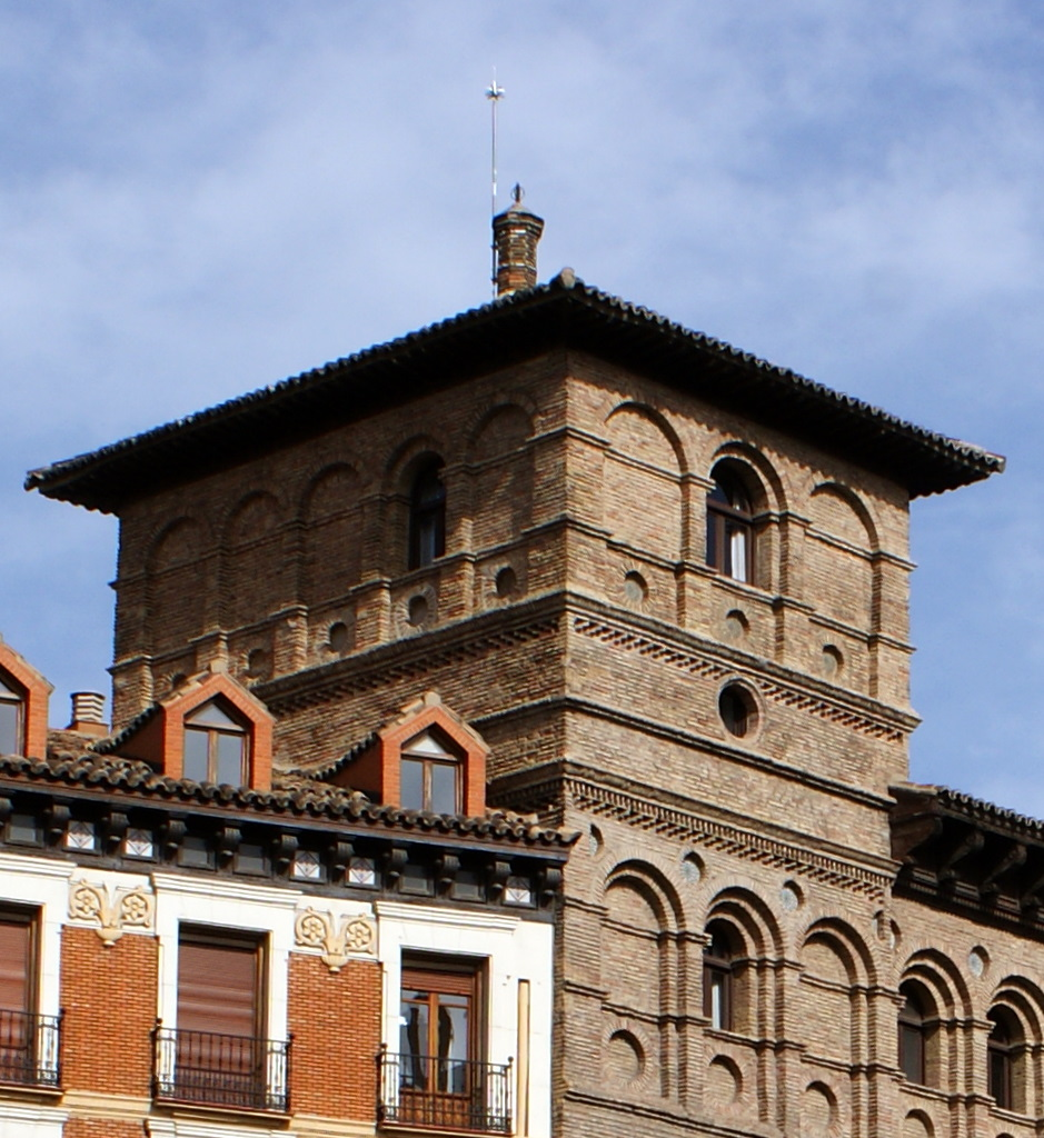 Torre de la Casa de la Audiencia o Palacio de los Condes de Morata de Jalón, marqueses de Villaverde, condes de Argillo, también llamado Palacio de los Luna, es una casa palacio renacentista del siglo XVI construida por orden de don Pedro Martínez de Luna, primer Conde de Morata y Virrey de Aragón. Zaragoza, Aragón